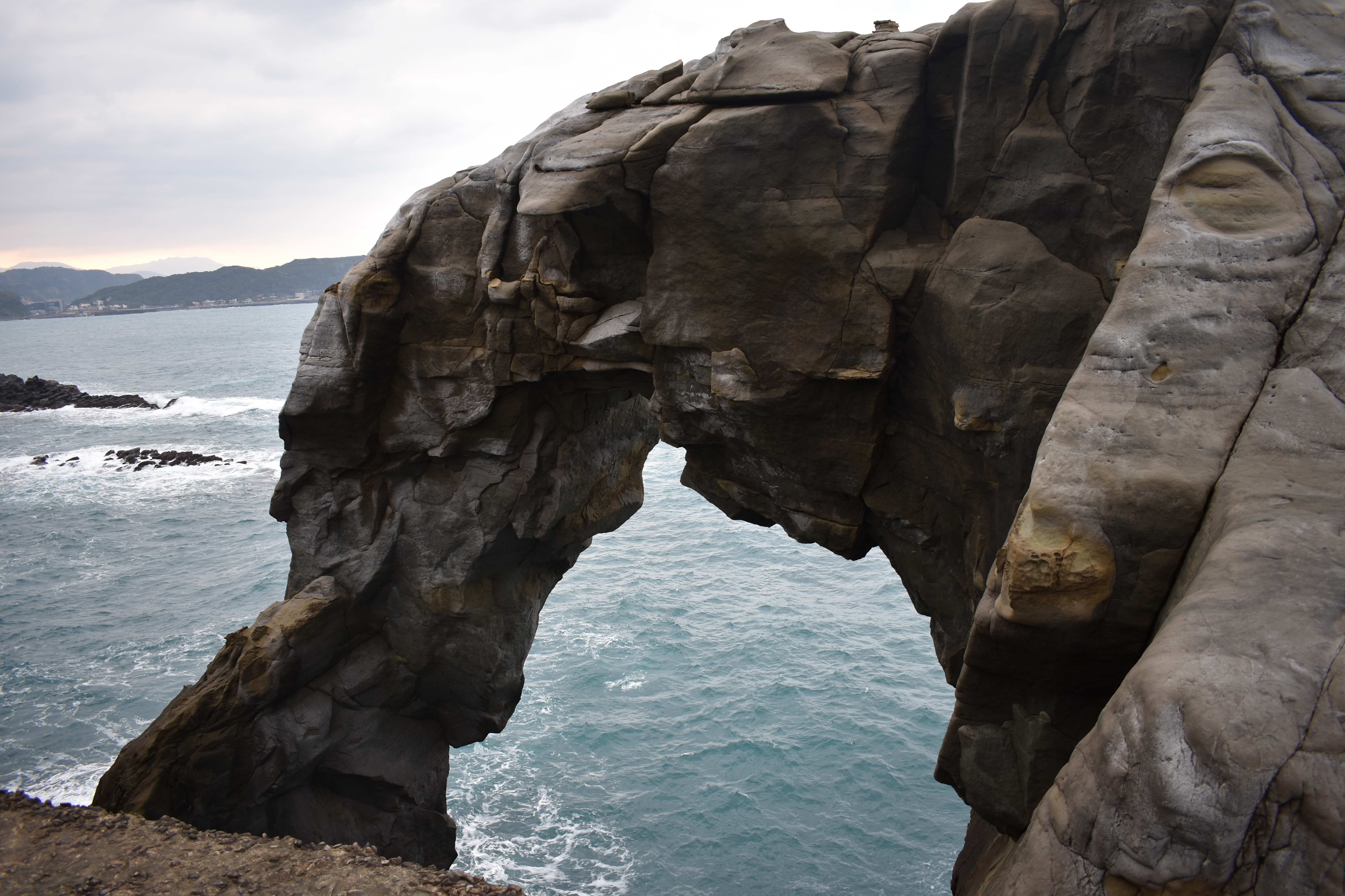 深澳岬角象鼻岩。